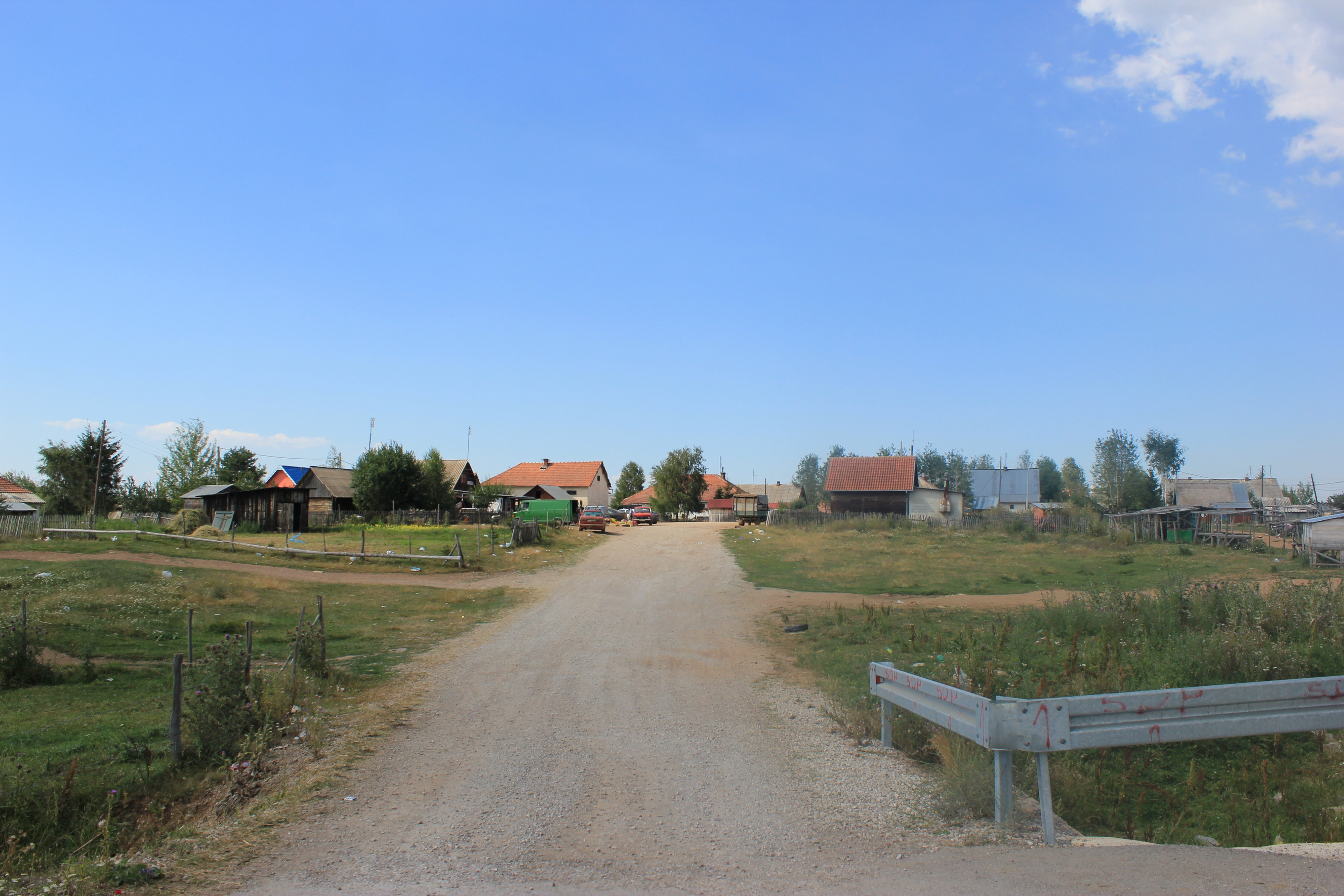 Das Dorf Karajukića Bunari südlich von Sjenica im Sandschak von Novi Pazar, Serbien.Hornjoserbsce: Wjeska Karajukića Bunari južnje Sjenicy w Nowopazarskim Sandźaku, Serbiska.